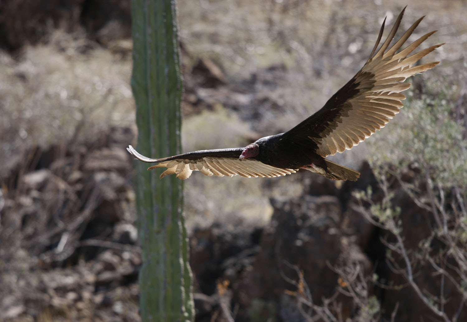 Truthahngeier (Cathartes aura) auf der Baja California